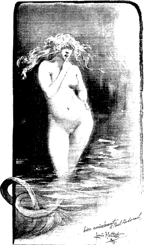 Une Fée des eaux, dédiée à Paul Redonnel